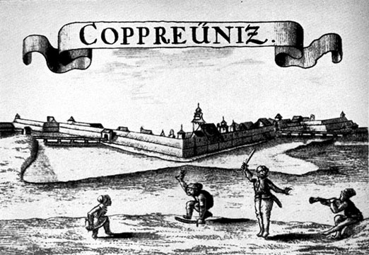 Koprivnica Hrvatska/Croatia